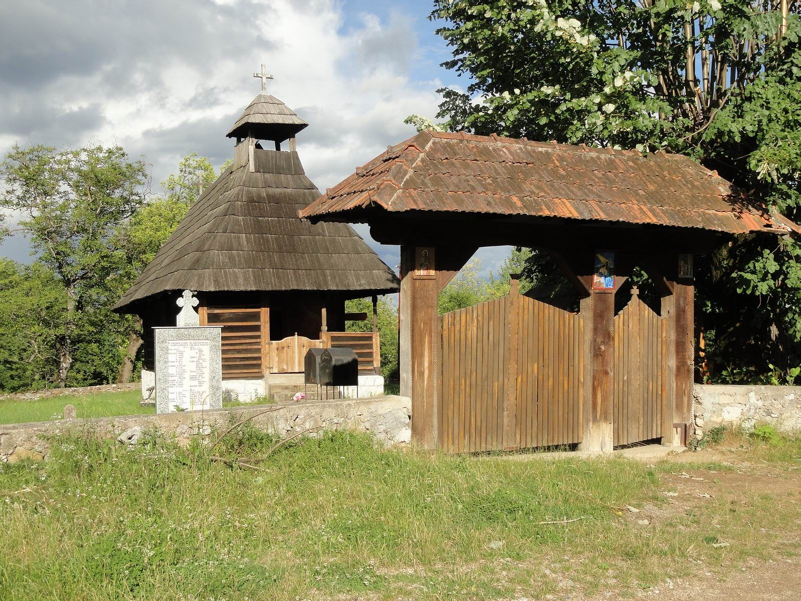 Église en bois dans le village Gornoviţa, departement Gorj, Roumanie, monument historique. Classification Commission nationale des monuments, des ensembles et des sites historique (CNMASI): CNMASI 25 B 167 Gornoviţa village - L'église "Nativité de la Vierge", construit en 1764, reconstruit de 1939 à 1945. Assuré.